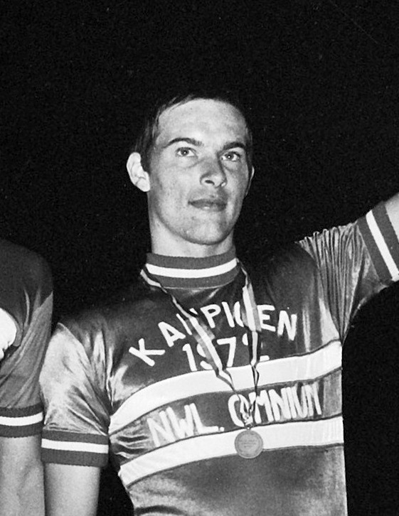 Nederlandse kampioenschappen Stayeren beroeps 1974; G. Slot